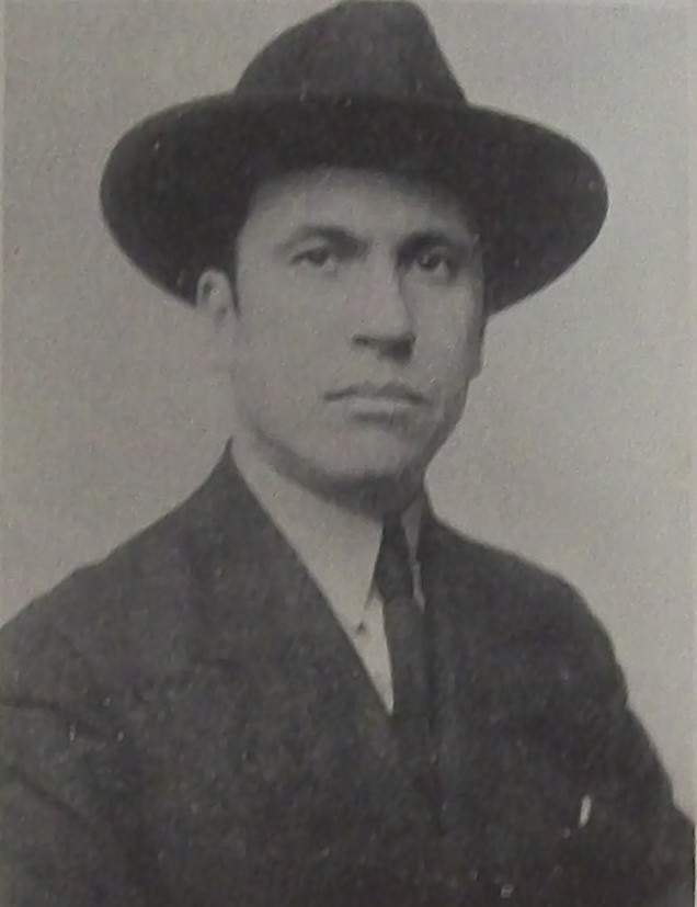 Antonio Zamora en 1922